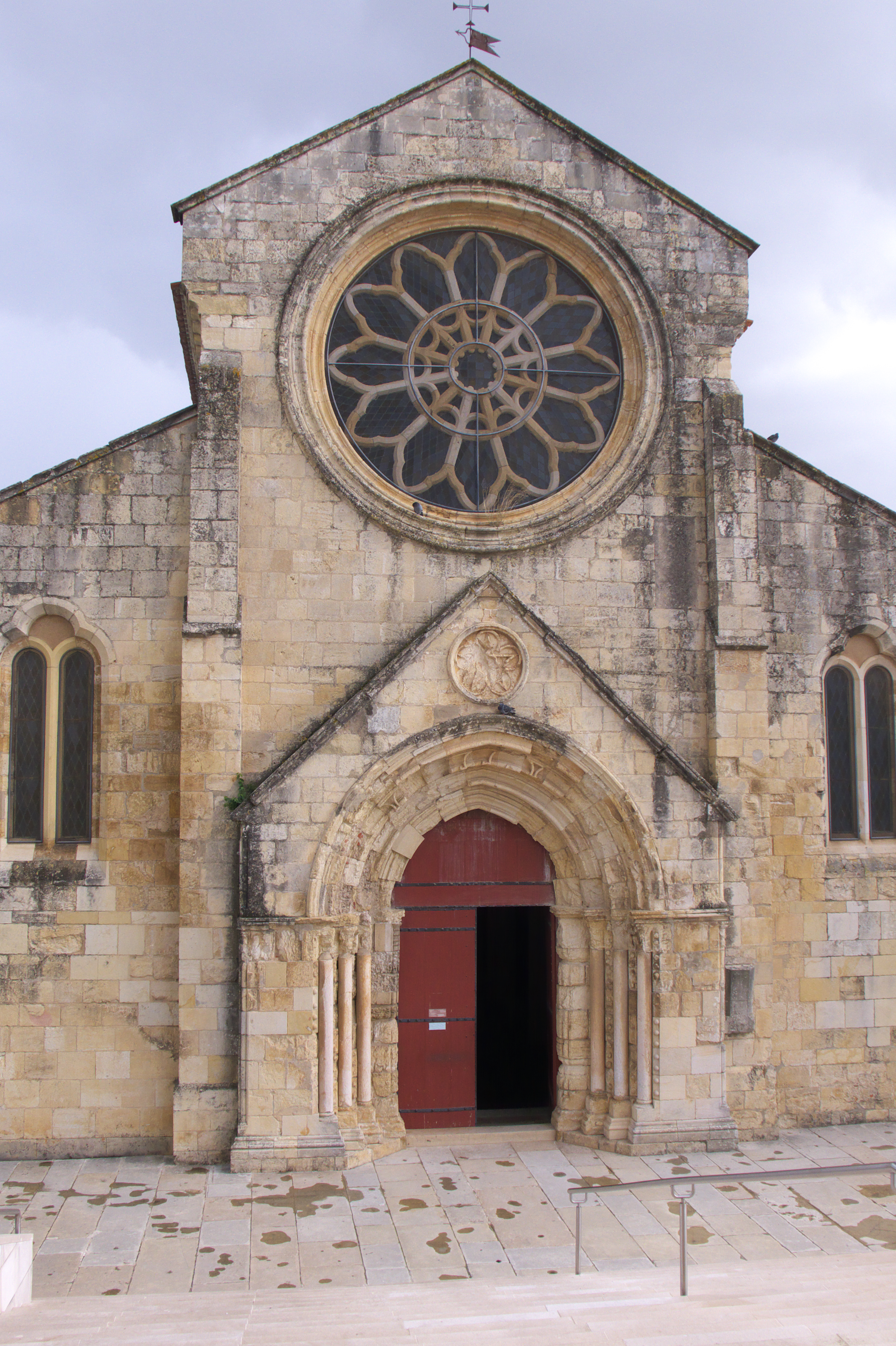 Los templarios introducen el arte gótico en Portugal.